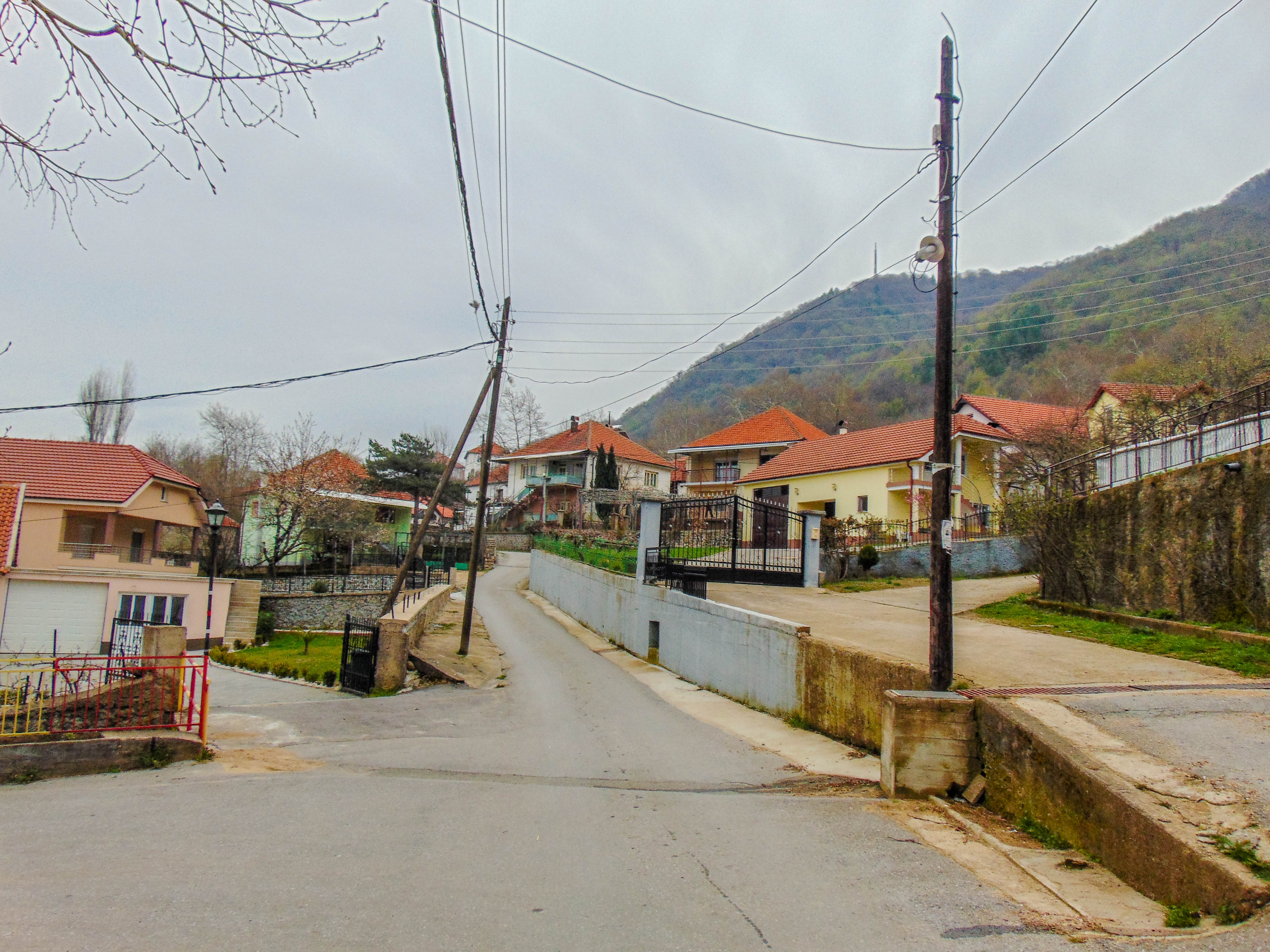 Мокрино